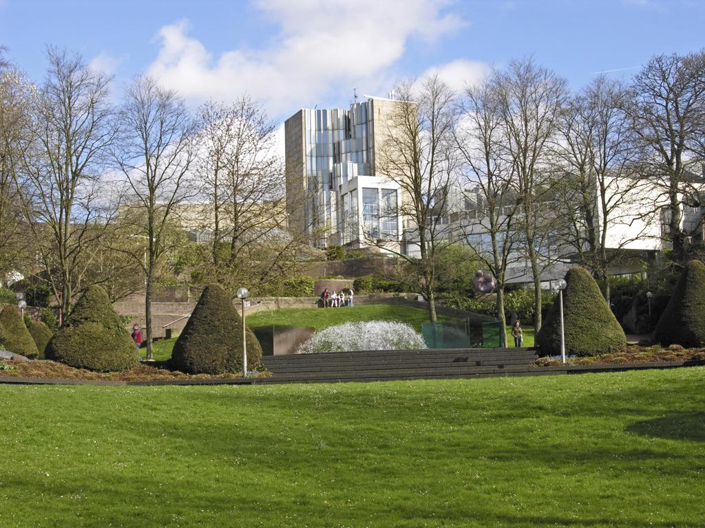 Beschreibung: Mönchengladbach, Museum Abteiberg mit Skulpturengarten Quelle: 07.04.2005 Fotograf: Hans Peter Schaefer Url: Lizenz: GNU FDL